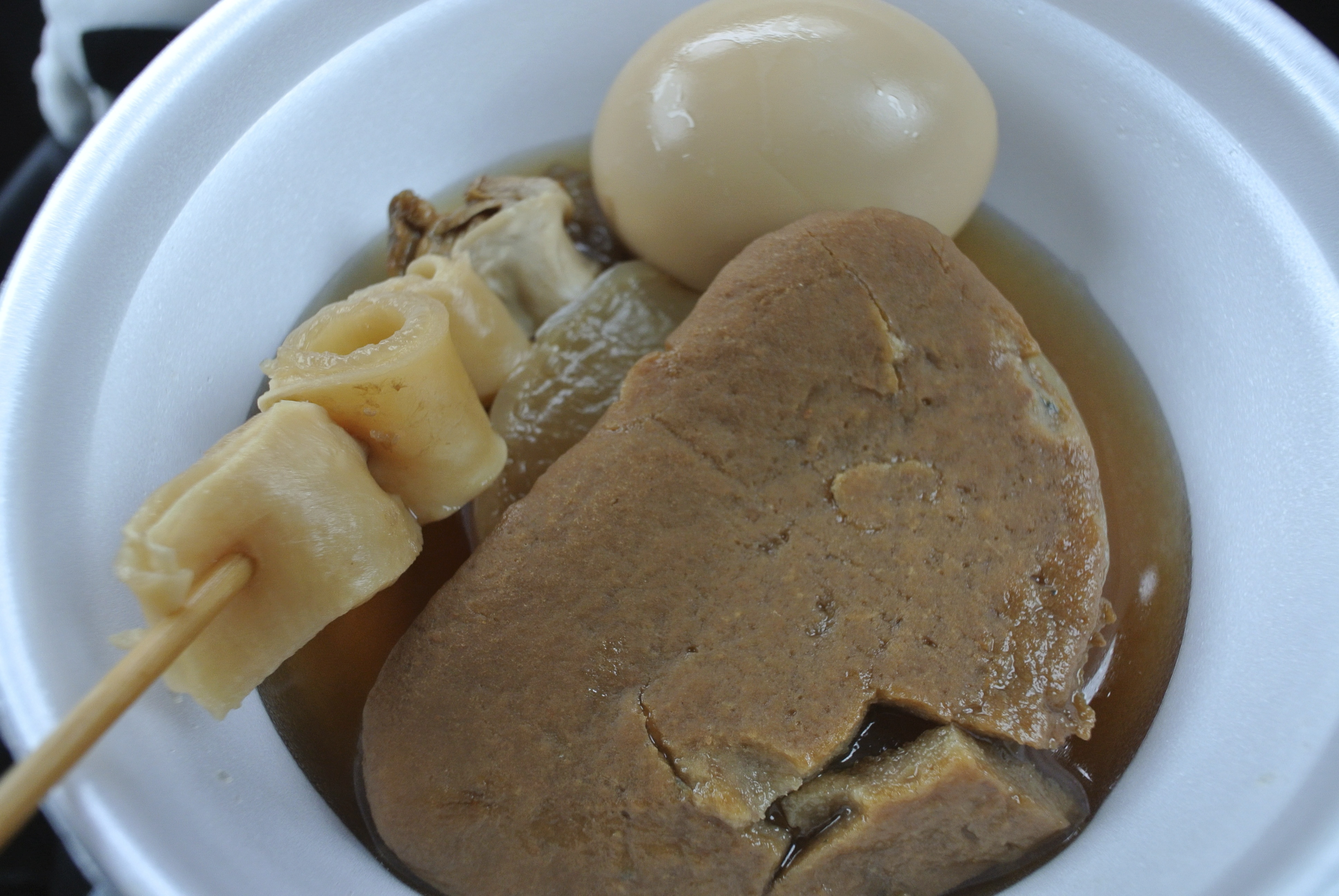 静岡おでん at 富士川SA